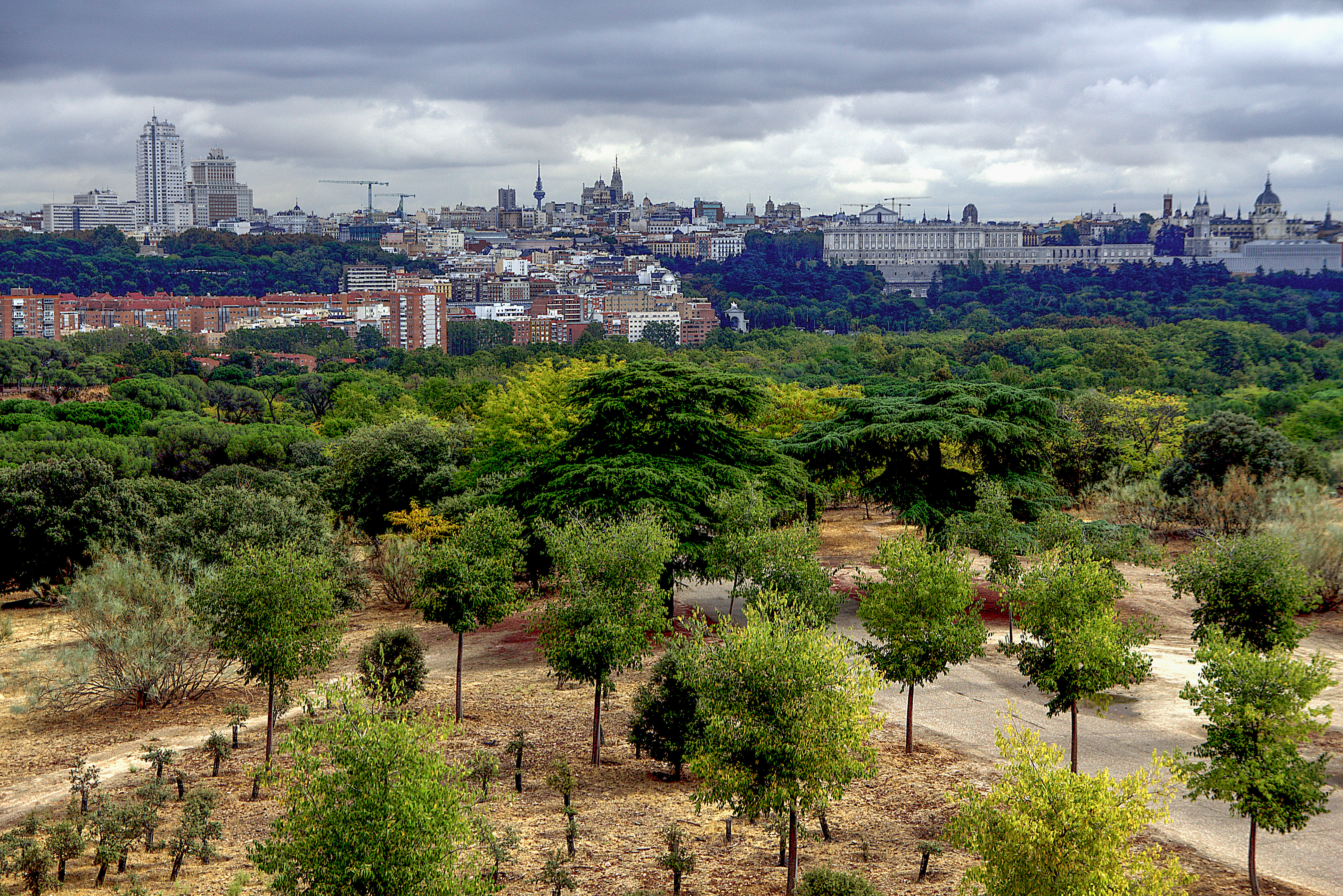 desde la Casa de Campo un cierto Madrid